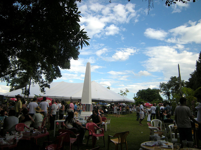 Público presente durante uma edição da Festa Confederada, em Santa Bárbara do Oeste, São Paulo, Brasil.